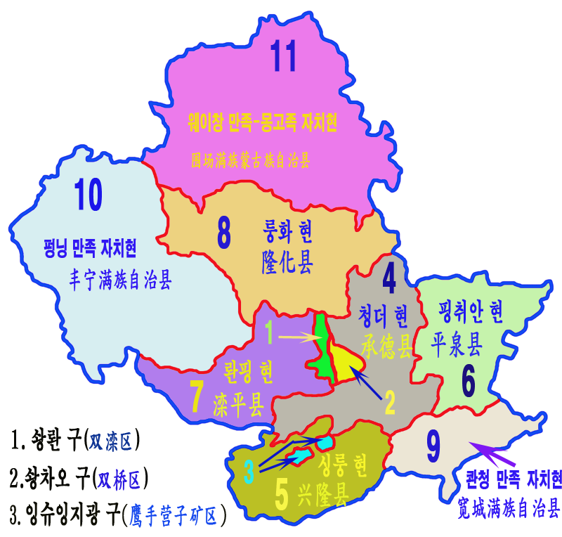 하북성 청더시 현급구역